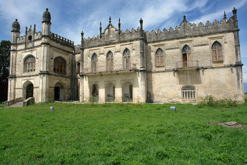 The Dadiani Palace Museum in Zugdidi, Samegrelo Region, Georgia.